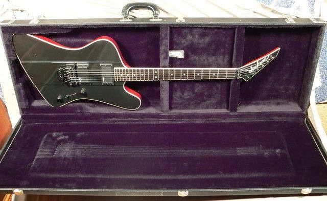 ジャクソンのファイヤーバード型ギター